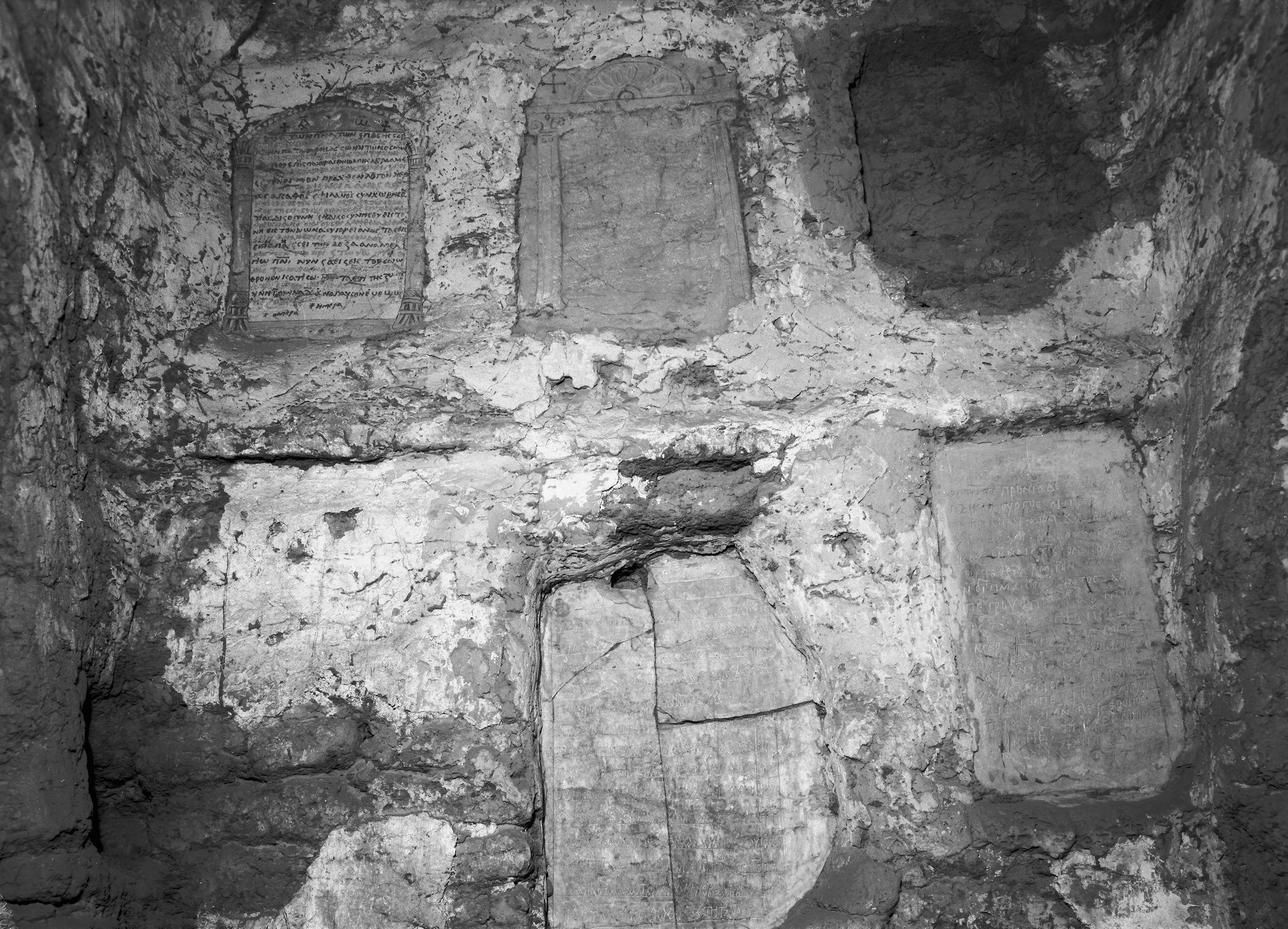 Wykopaliska w Faras